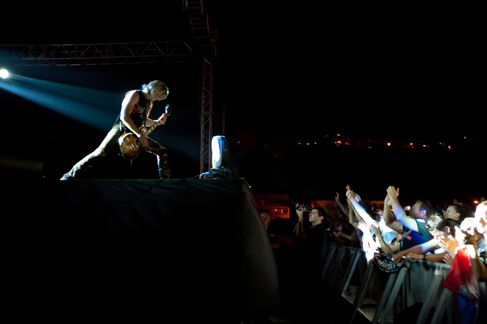 Ivan Ivanković s Markom Perkovićem Thompsonom u Crikvenici